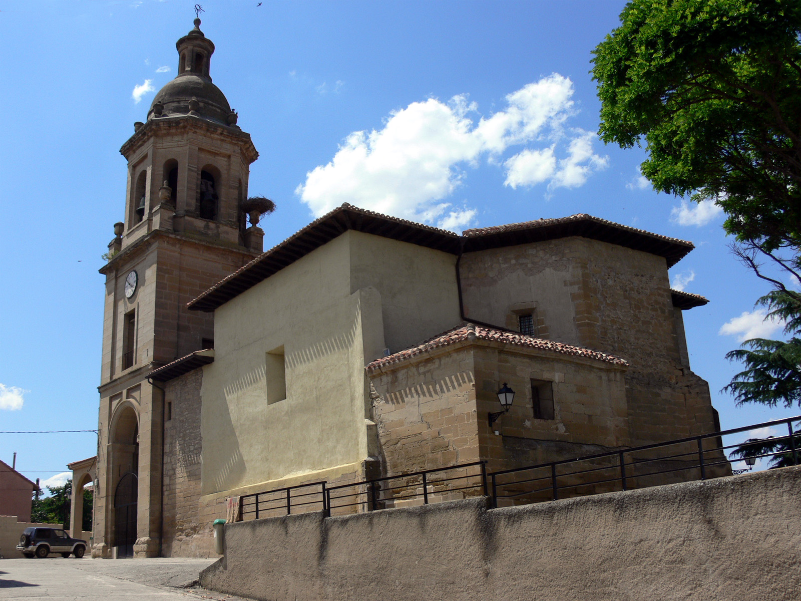 Iglesia de San Esteban en Tormantos (La Rioja, España)